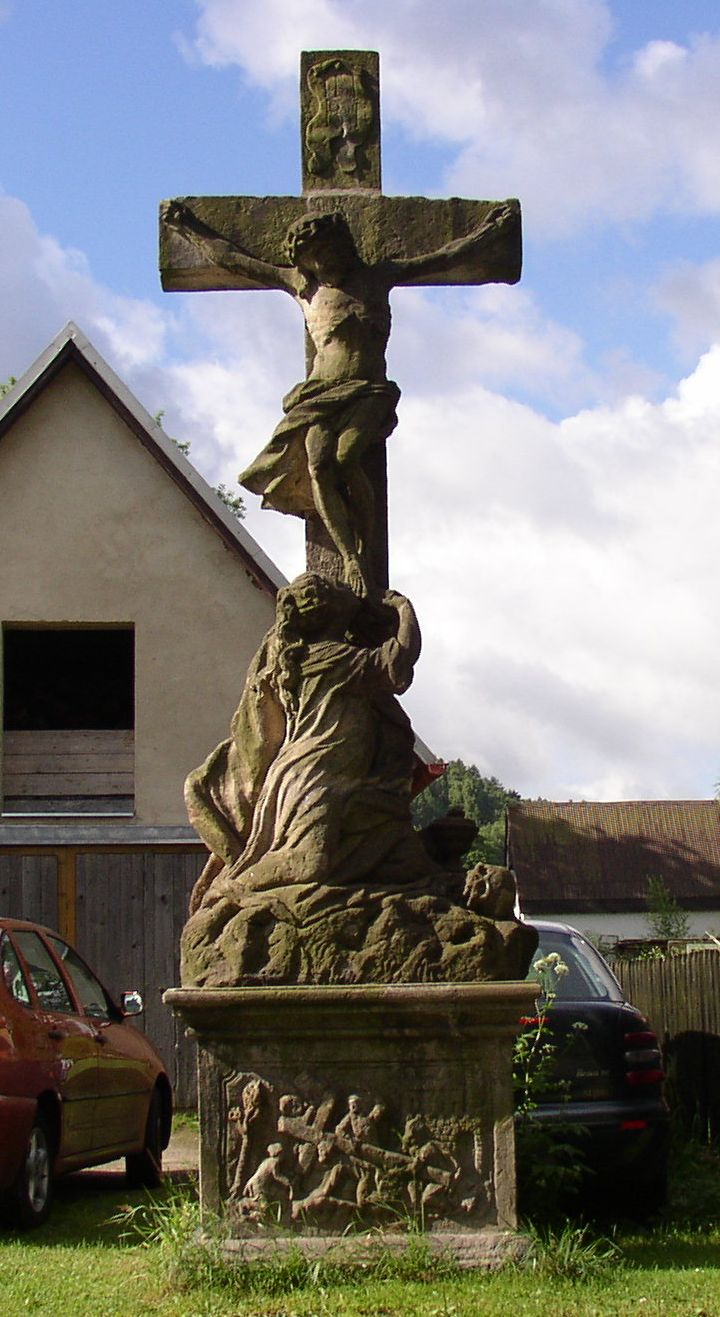 Horní Podluží - barokní sousoší Kalvárie z roku 1757.